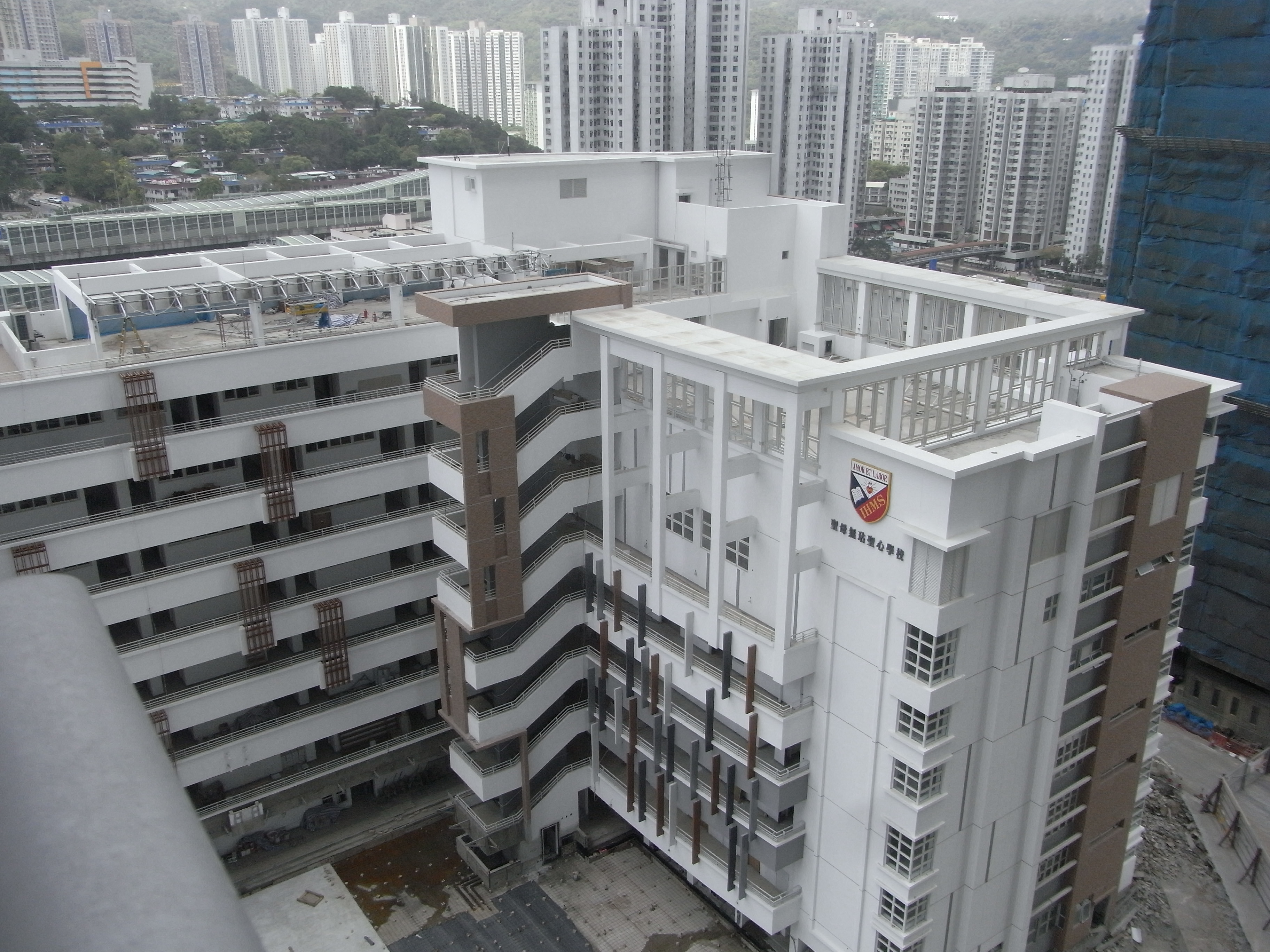 中文（香港）: 沙田區大圍名城 (香港)外望風景